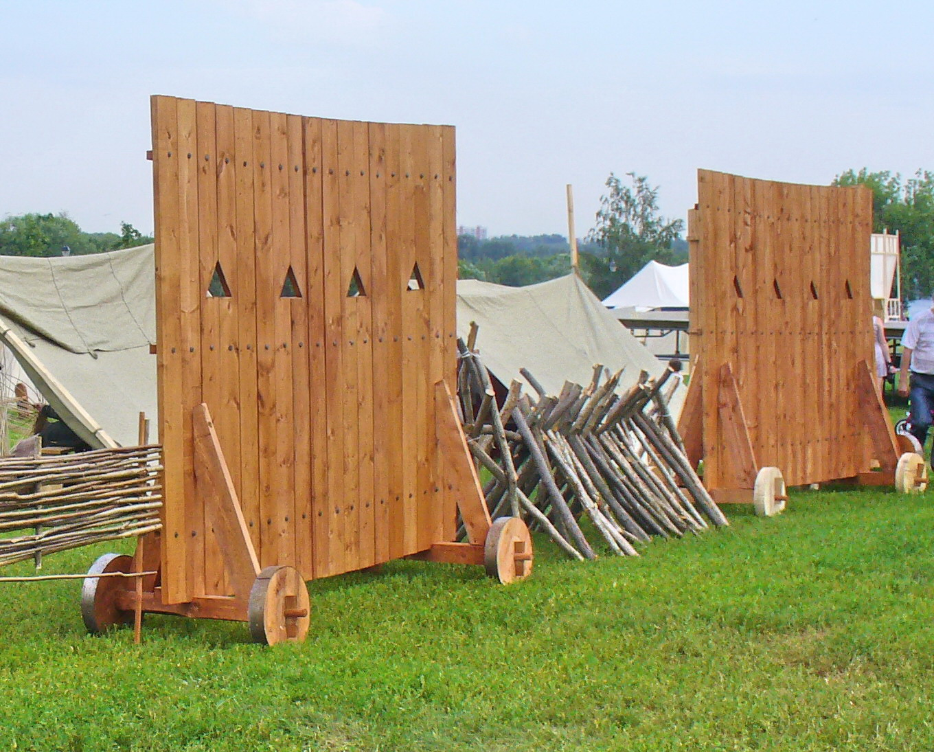 Фестиваль исторической реконструкции "Времена и эпохи" в Коломенском. Реконструкция гуляй-города.